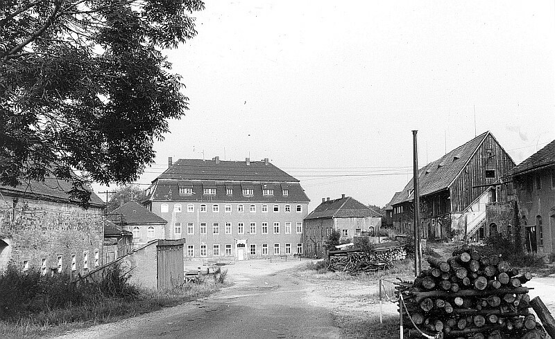 Original image description from the Deutsche FotothekTriebischtal-Tanneberg. Schloß mit Rittergut